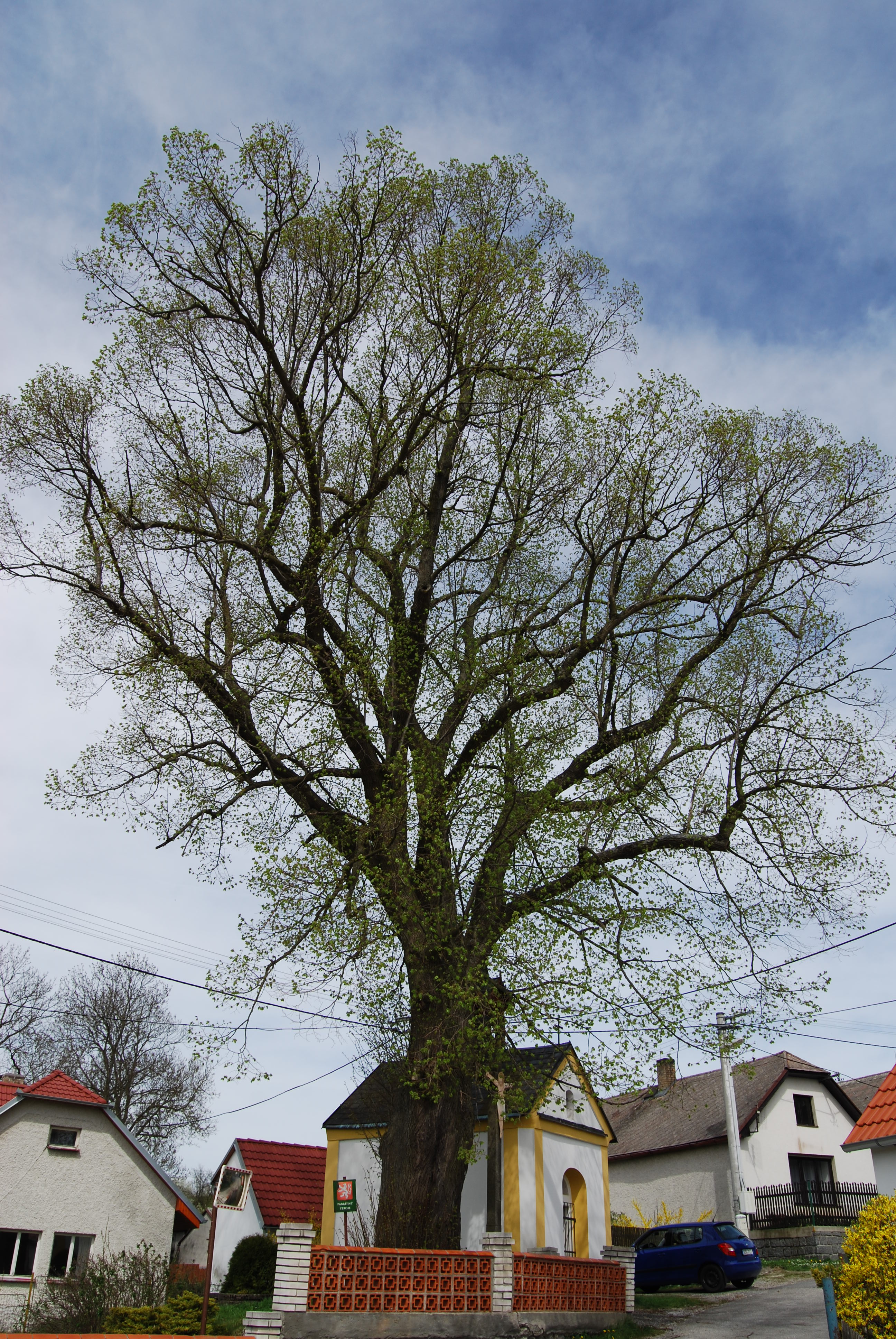 Památný strom v obci. Květuš je vesnice, část obce Chyšky v okrese Písek. Česká republika.